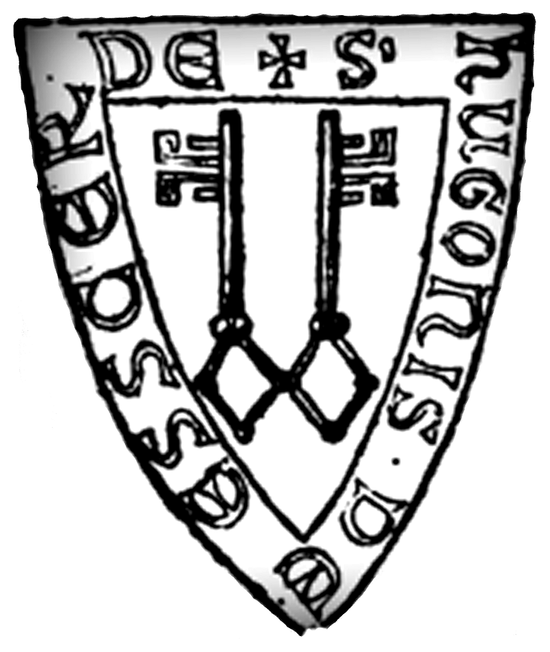 S.(igillum) HUGONIS DE ESSCERDE